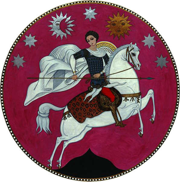 Официальный герб Грузинской демократической республики. Автор рисунка — Иосиф (Осип) Адольфович Шарлемань.